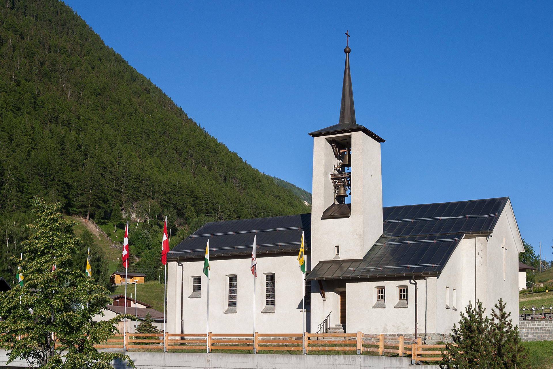 Kirche in Oberems (VS)